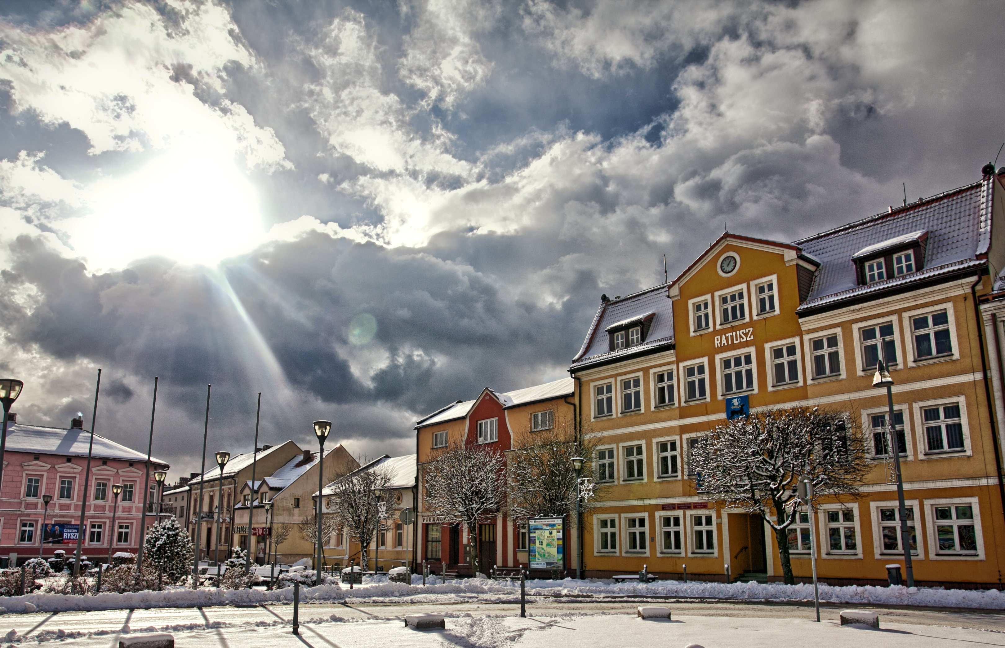 gmina Bieruń, Kościół parafialny pw. św. Bartłomieja, 1770-1776, 1851-1858